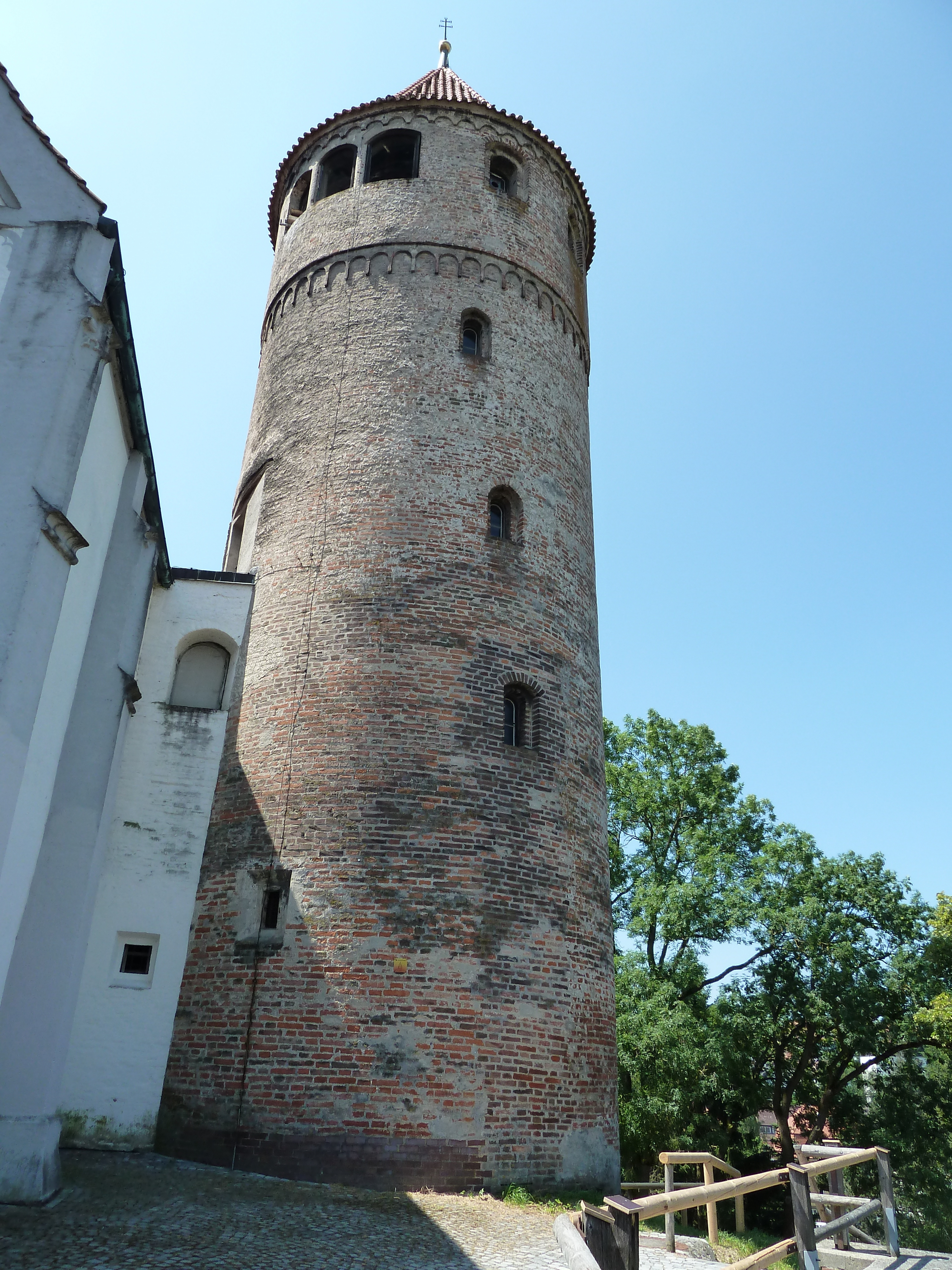 Blasiusturm in Kaufbeuren